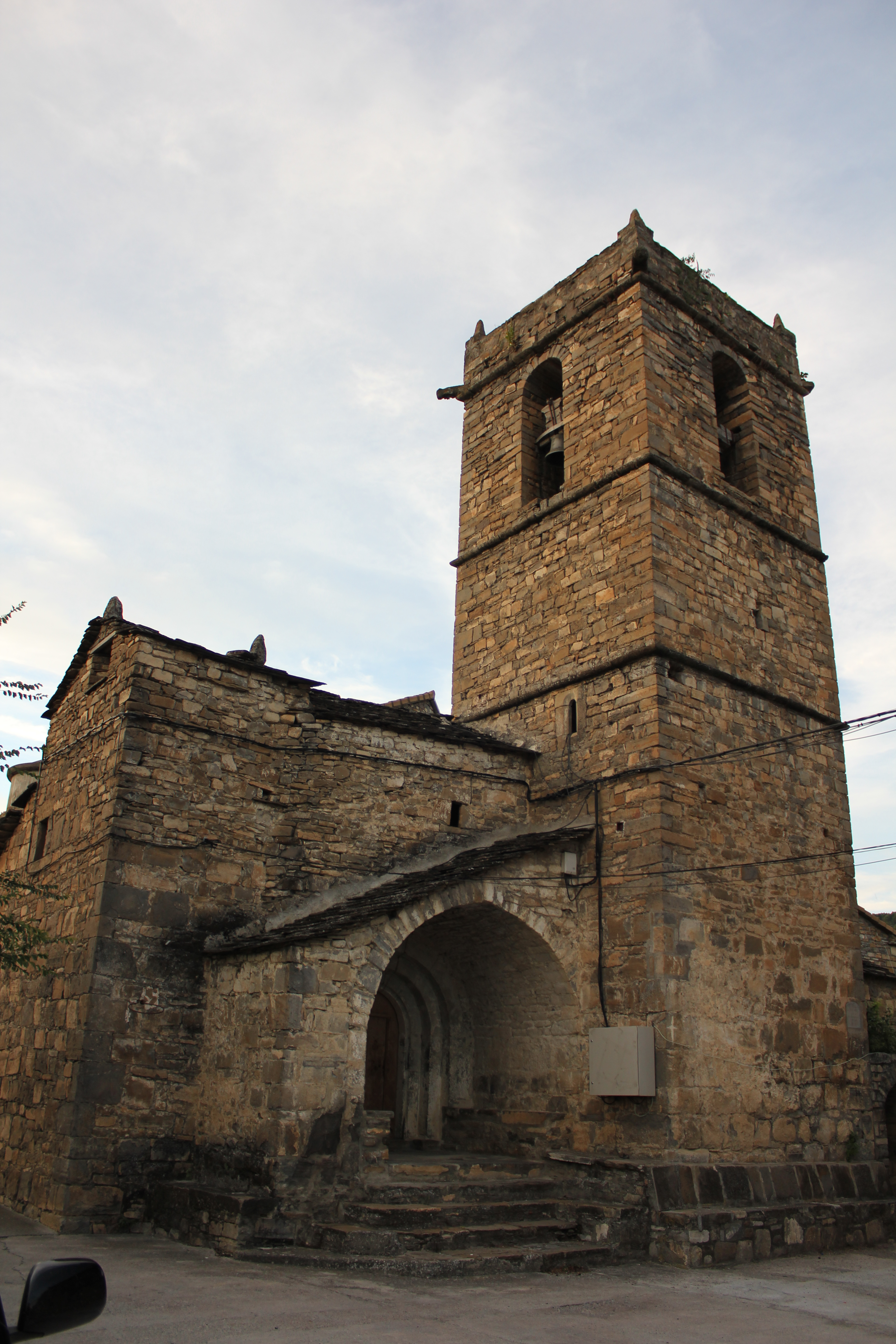 Aragonés: Campanal d'a ilesia d'Arro